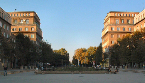 Architektura Nowej Huty (Aleja Róż) 2003